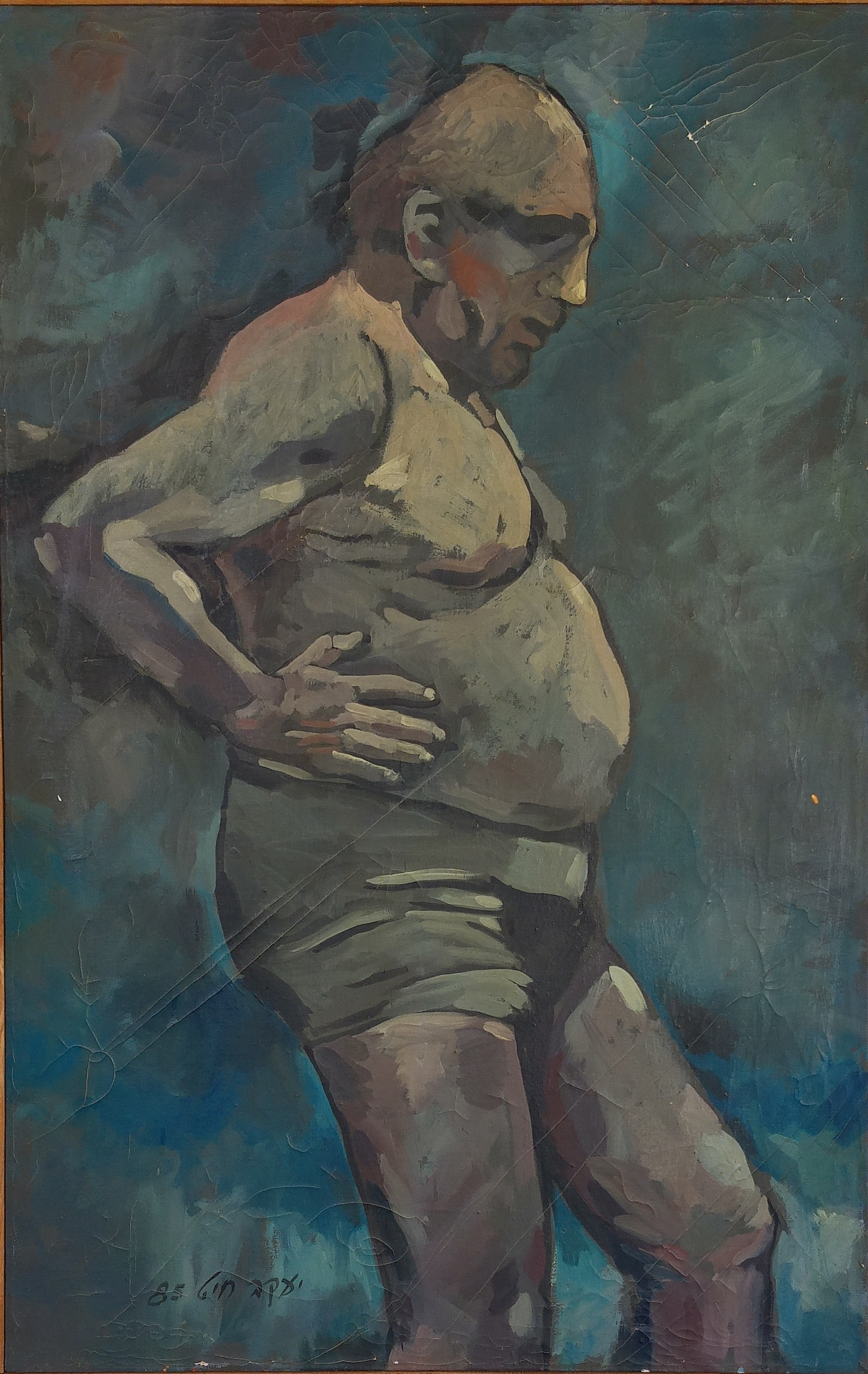 הטובל בים, יעקב חייט (הוצג בבינאלה)